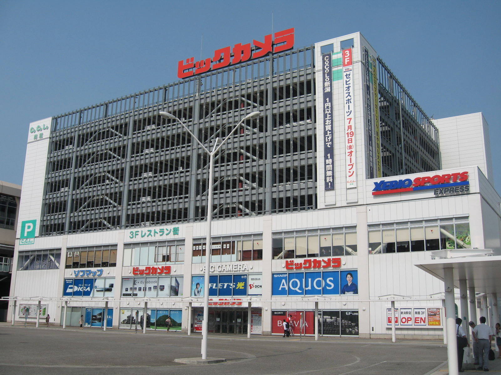 新潟市中央区。新潟駅CoCoLo南館の画像。